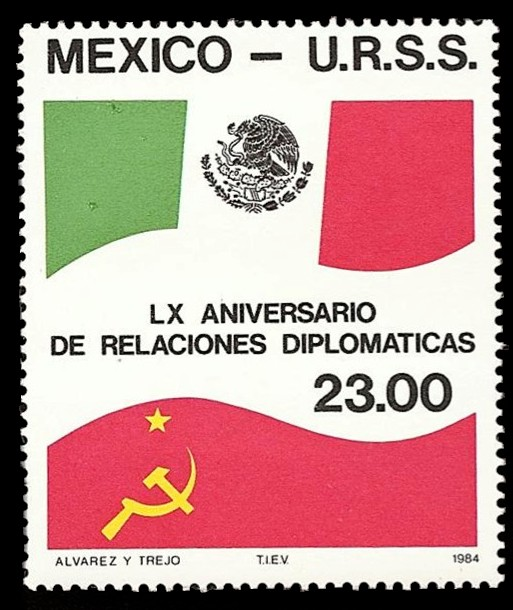 Alusivo al 60 Aniversario de las relaciones diplomáticas entre México y la U.R.S.S.